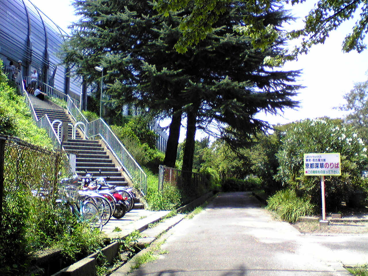 名神ハイウェイバス等が発着する深草バスストップの東京方面入口階段